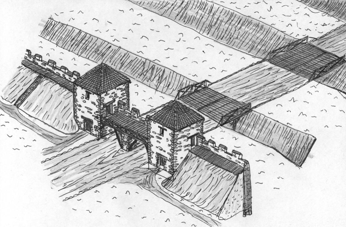 Rekonstruktionsversuch Haupttor Kastell Künzing, Steinbauphase